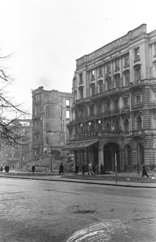 Berlin, Hotel "Kaiserhof", Zerstörungen ADN-ZB/Archiv II. Weltkrieg 1939-45 Zerstörungen durch anglo-amerikanische Bombenangriffe 1945 auf Berlin, das Hotel "Kaiserhof" am Wilhelmplatz (Aufnahme entstand vor dem 22.3.1945) 320-45